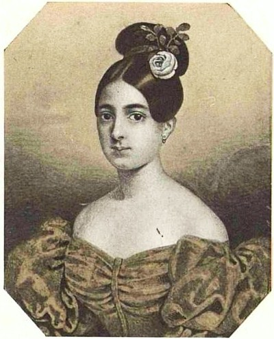 Елена Стурдза (1804—1854), с 1825 года жена Григория Гика.